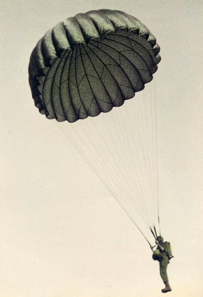 Algérie, 30 août 1944. 3e saut du sergent Simorre (4e compagnie). Photographie prise par le Sergent Guionnet. Photographie colorisée en 1948 par Mr Simorre. A noter la voilure camouflée et le port de "rangers". Collection Henri Simorre. Autorisation de publier la photographie via le site (Cf.